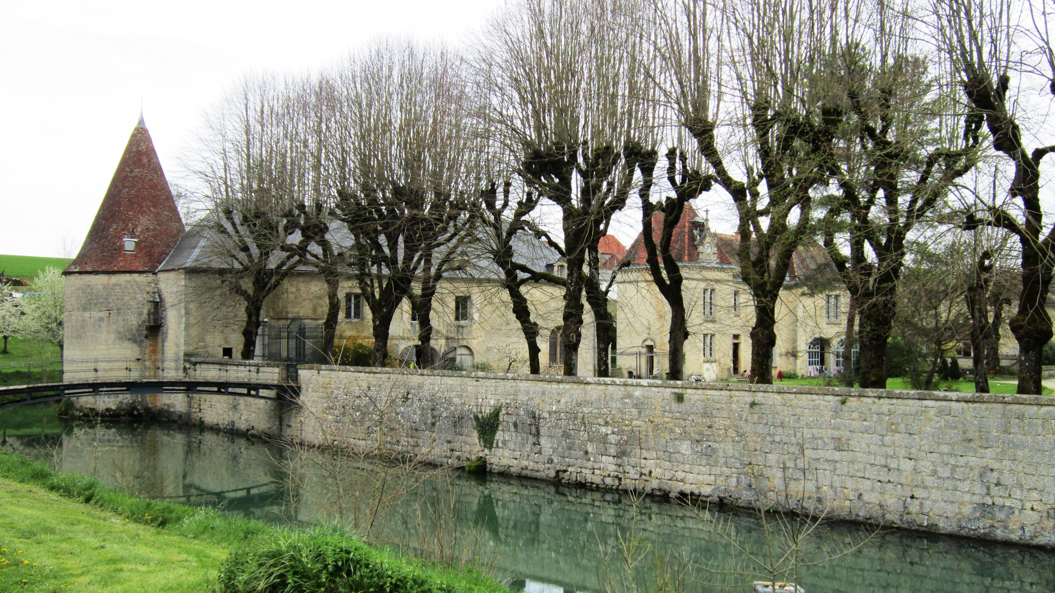 Château de Mauvilly (Côte-d'Or)